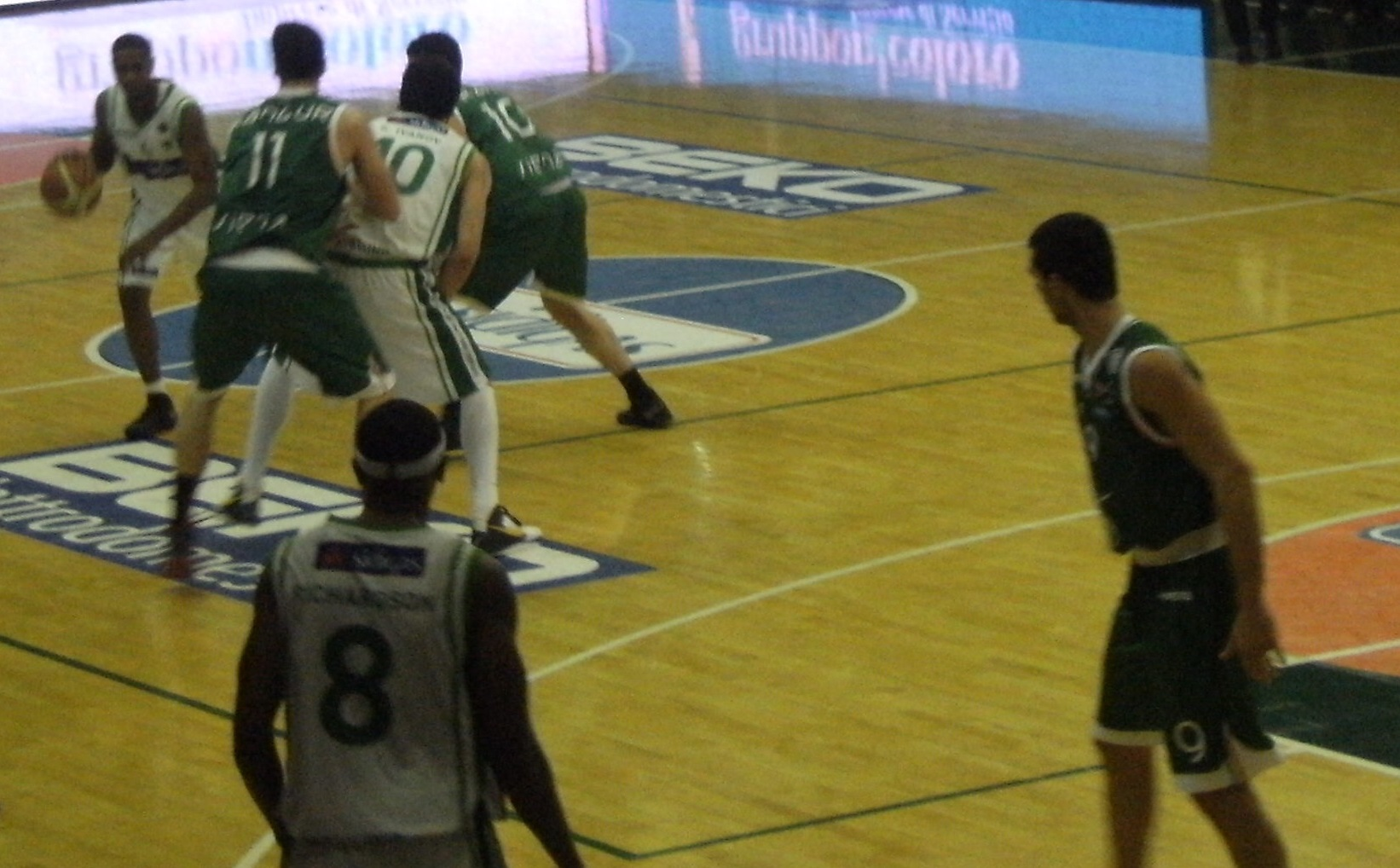 Felice Scandone 1948 Avellino - Mens Sana Basket / 75-70 / Palasport Giacomo Del Mauro di Avellino / 1 aprile 2013